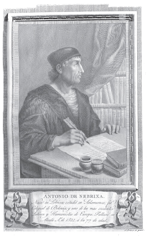 Retrato de Elio Antonio de Nebrixa